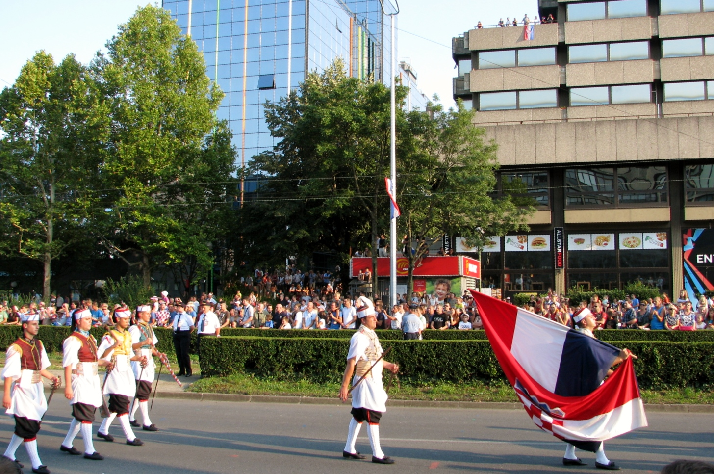 Viteška udruženje Kumpanjija - Blato na svečanom mimohodu u Zagrebu, 4. kolovoza 2015.